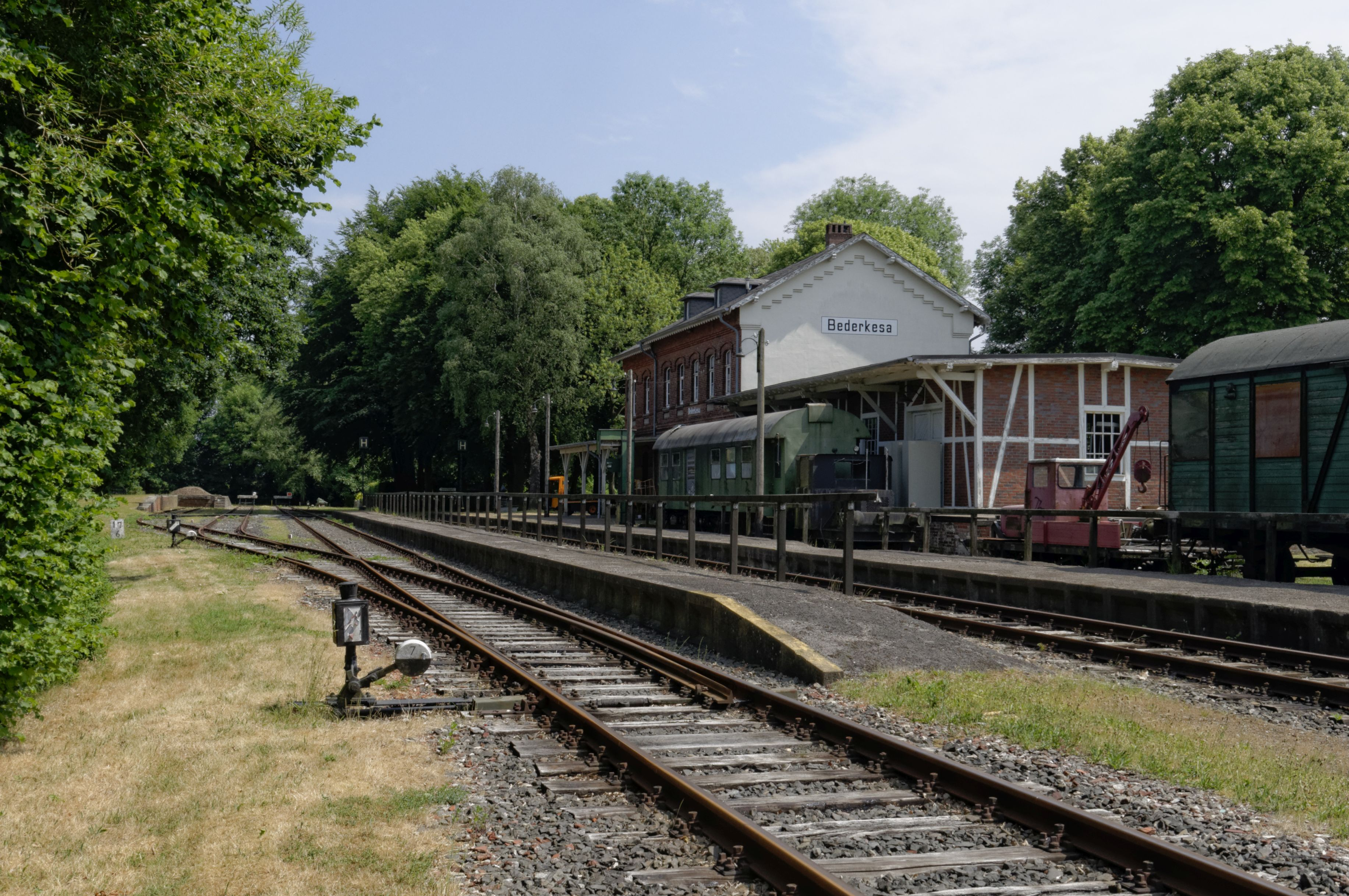 Der Bahnhof von Bederkesa, heute Sitz der Museumsbahn Bremerhaven - Bederkesa e.V.